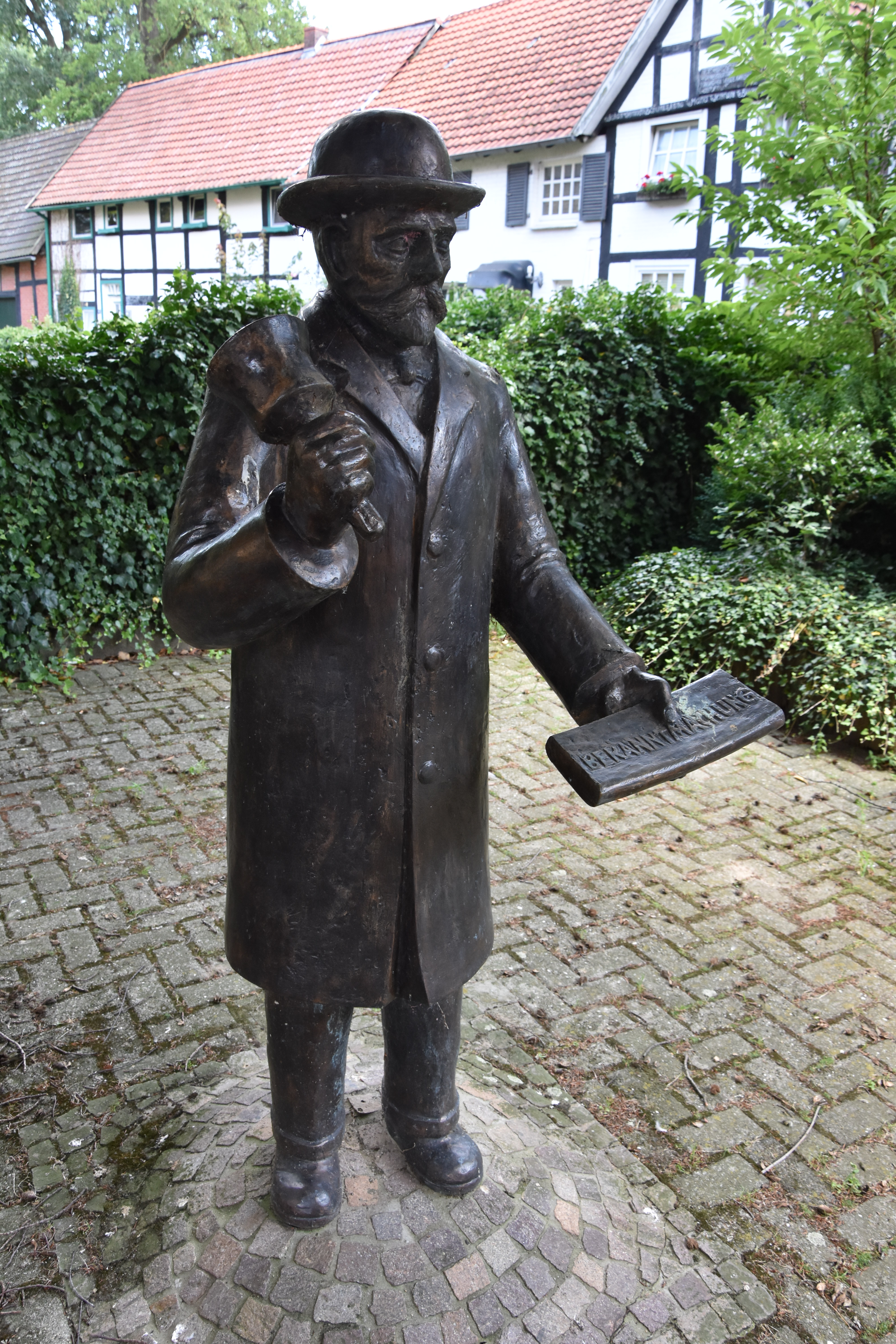 Statue in der Kirchhöfnerei Alfhausen